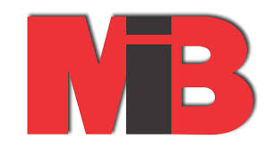 MIB logo